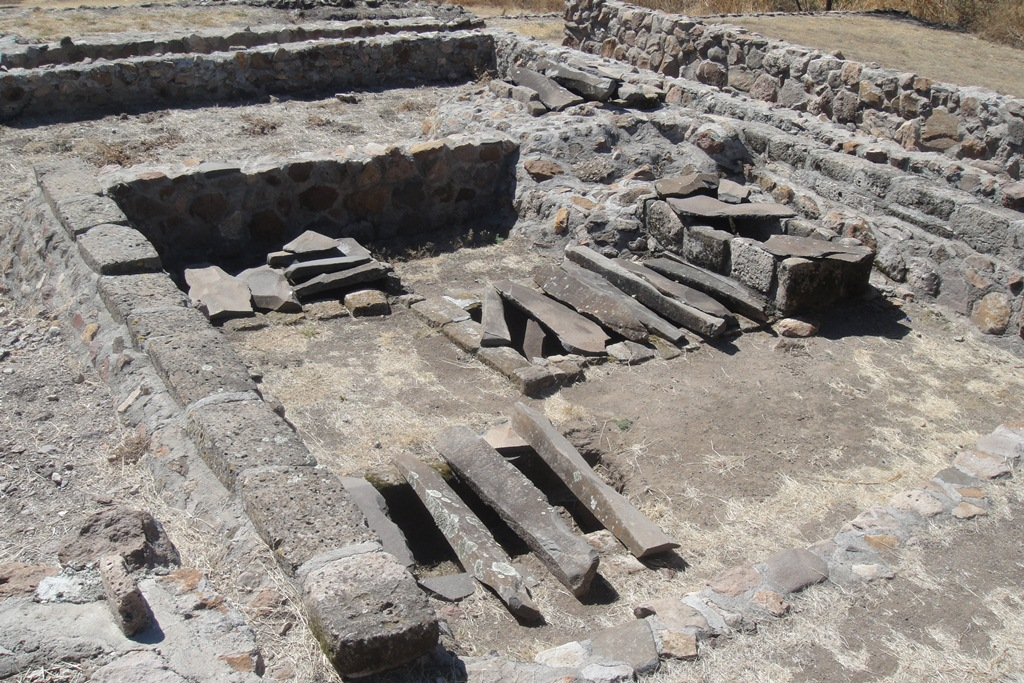 Template:Huandacareo, burials